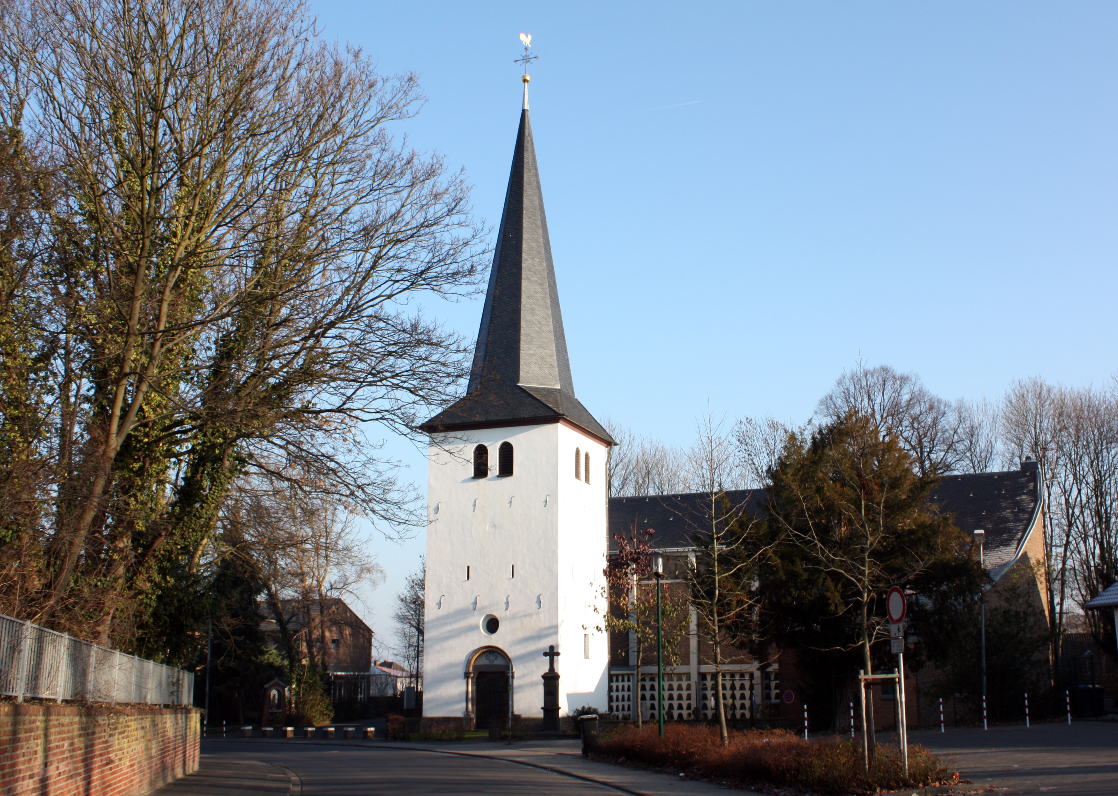 St. Johann Baptist Kendenich, Westseite